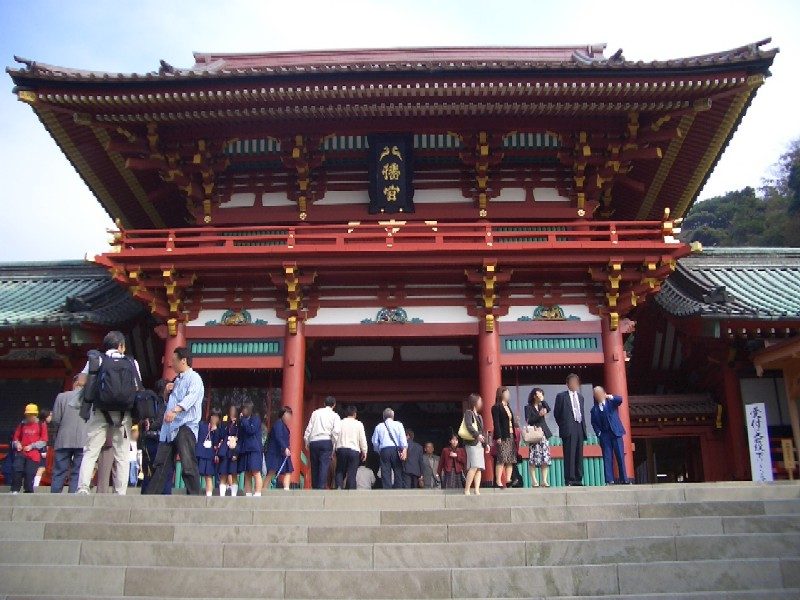 Tsurugaoka-hachimangu main shrine